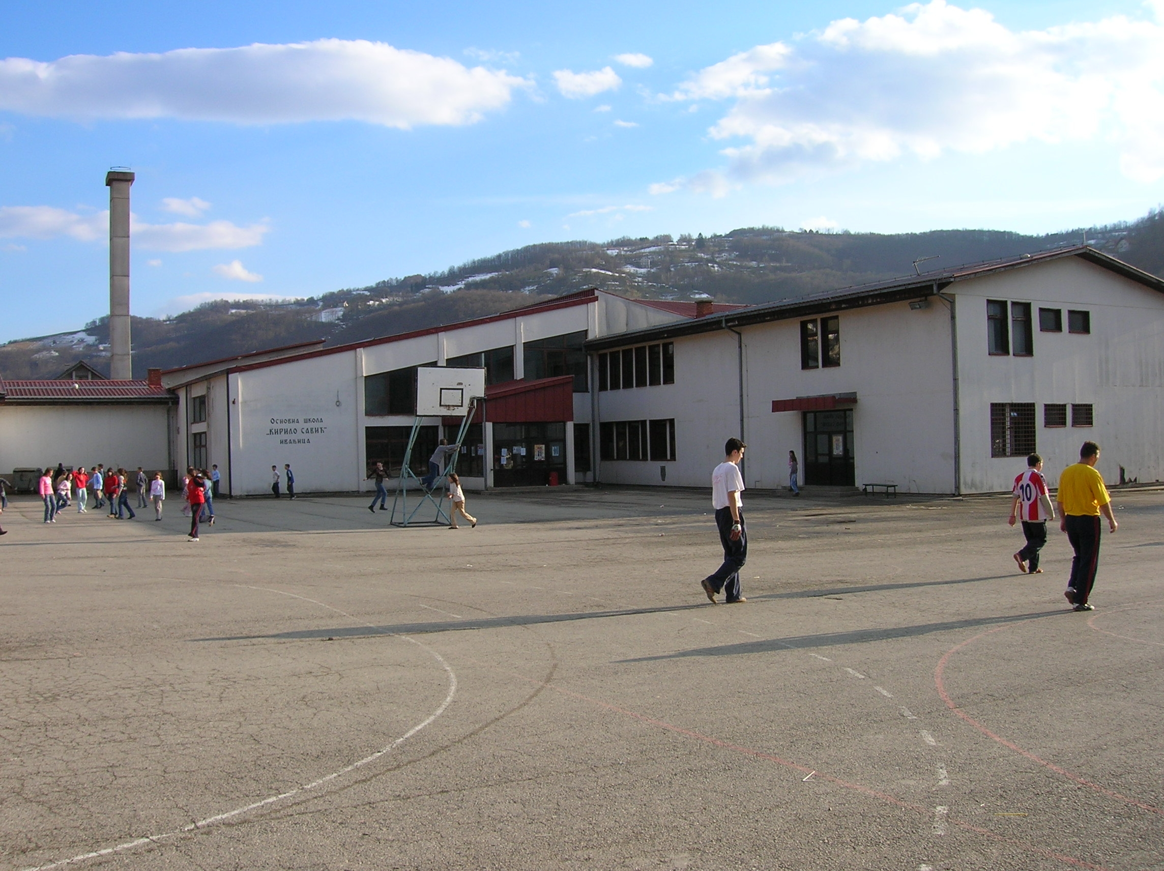 OŠ Kirilo Savić Ivanjica